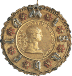 Medaglia di Isabella d'Este (1474-1539)